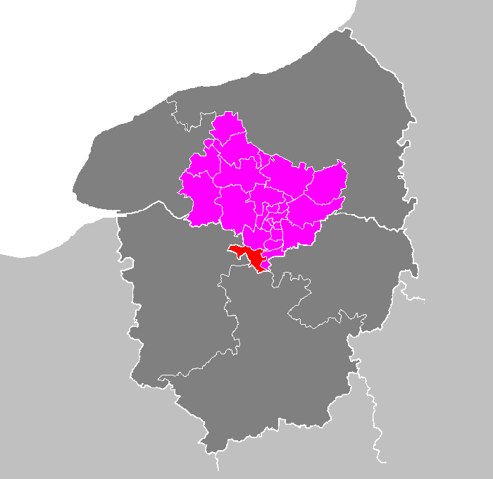 Maps of arrondissements and cantons of France: Arrondissement de Rouen - Canton d Elbeuf.PNG